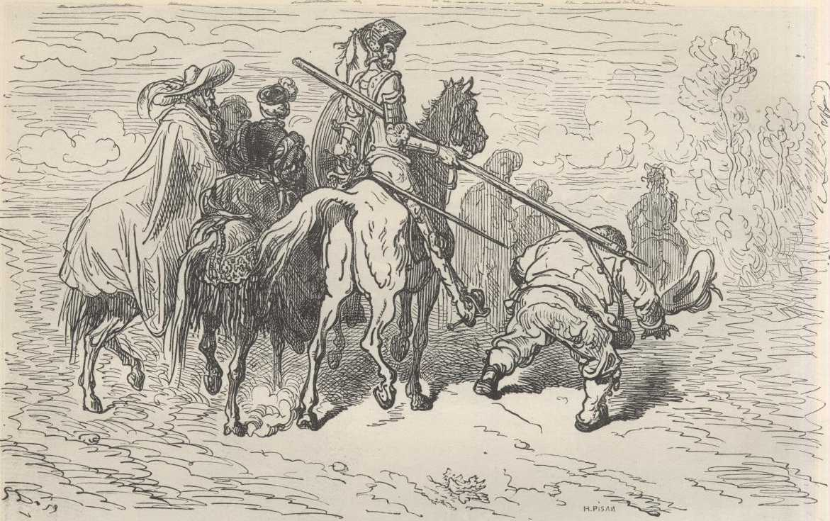 Gustave Doré, ilustração para "Dom Quixote" de Miguel de Cervantes